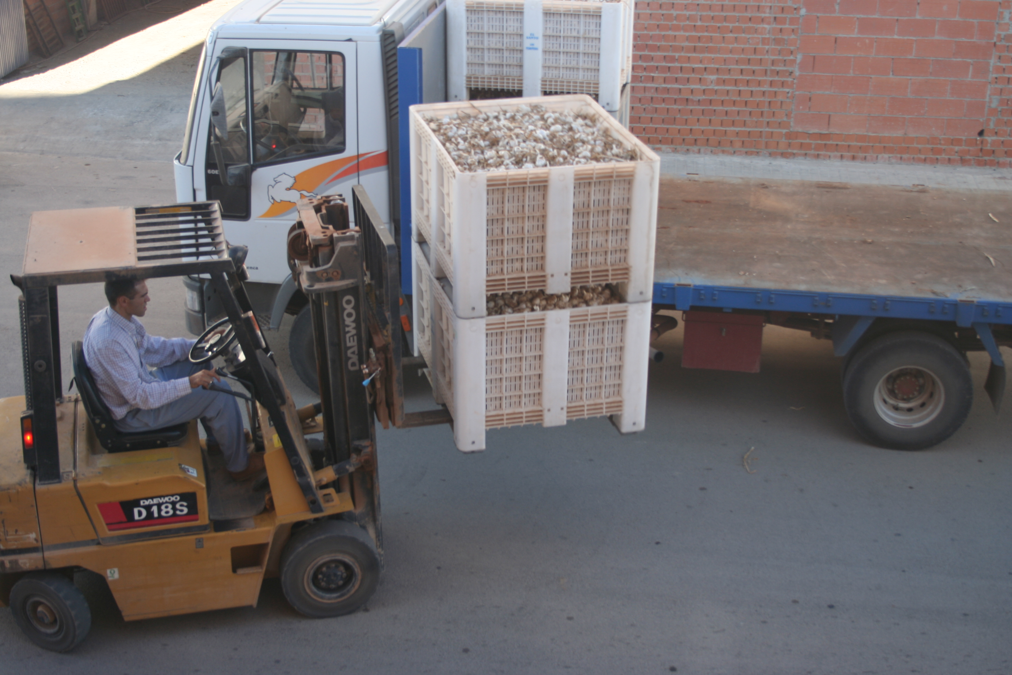 Cargando un camión de ajos en Las Pedroñeras.